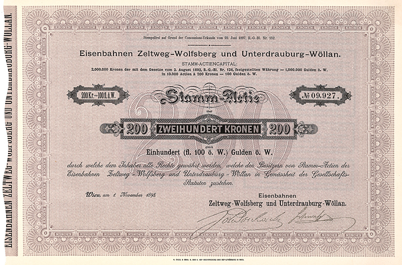 Aktie über 200 Kronen der Eisenbahnen Zeltweg-Wolfsberg und Unterdrauburg-Wöllan vom 1. Januar 1898